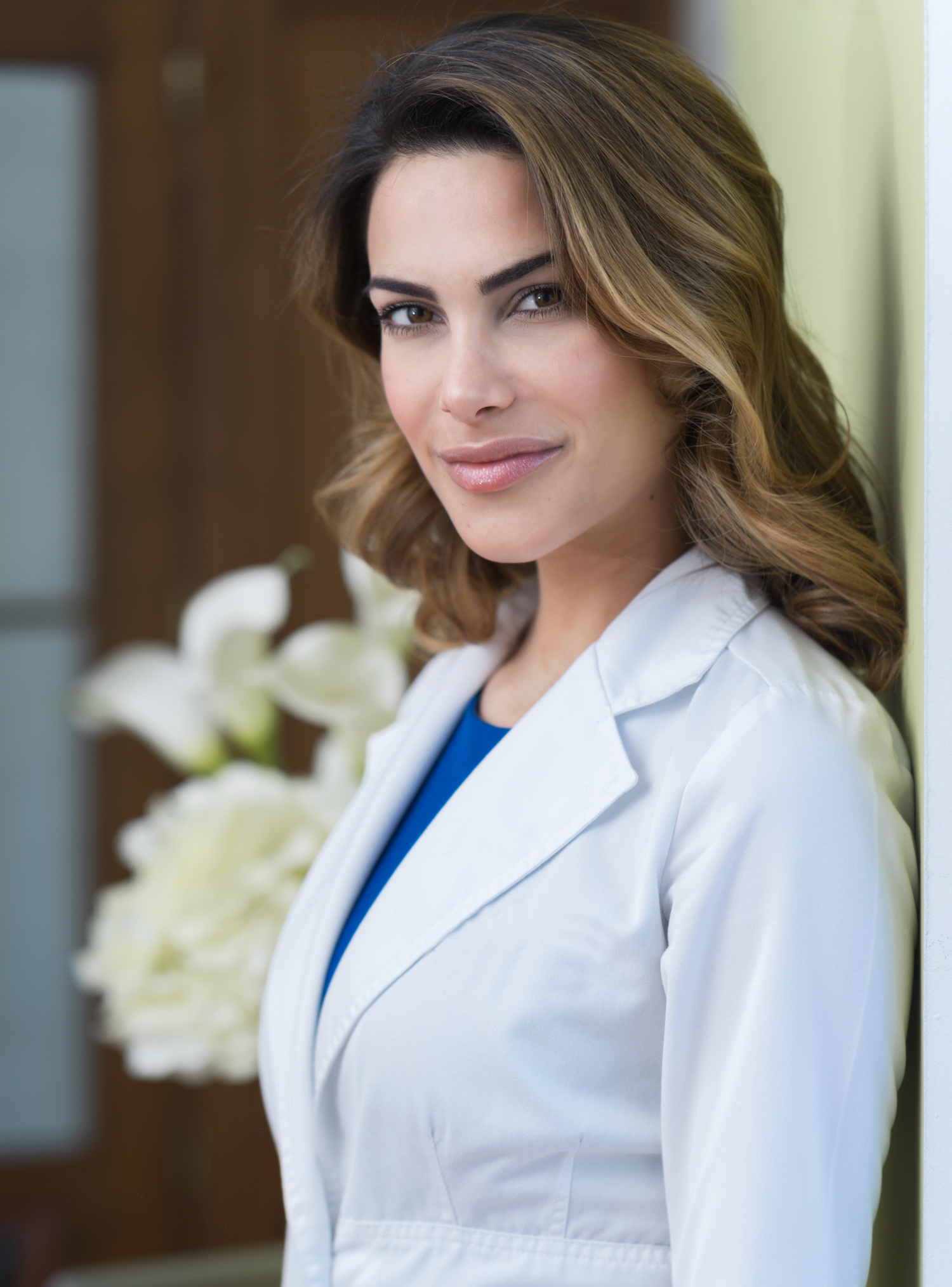 La Doctora Carla Barber, licenciada en medicina por la Universidad de Las Palmas de Gran Canaria